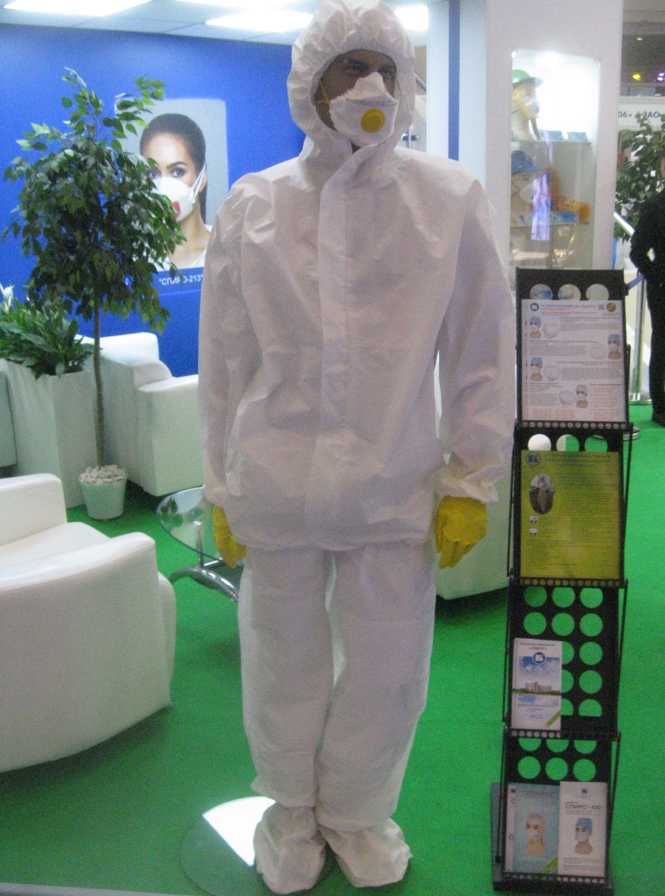 Фото с выставки СИЗ и спецодежды (БИОТ-2019). Средство индивидуальной защиты органов дыхания.